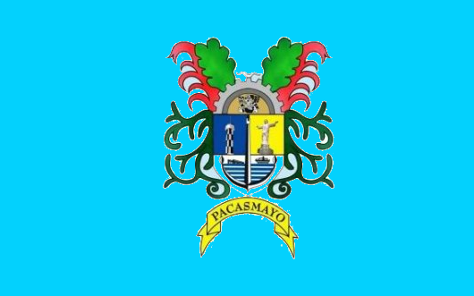 Bandera de la ciudad de Pacasmayo - Peru